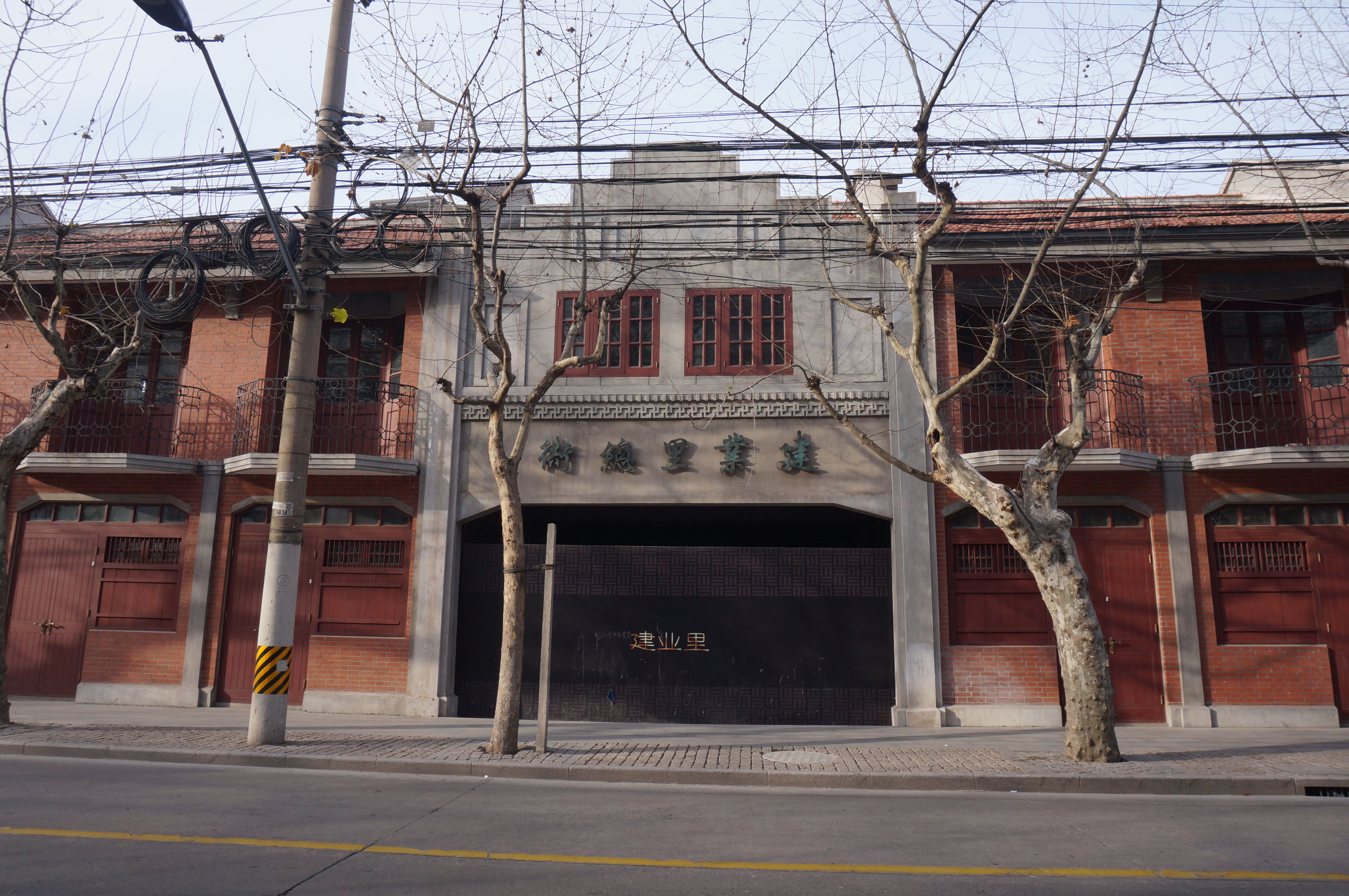 建业里大门入口